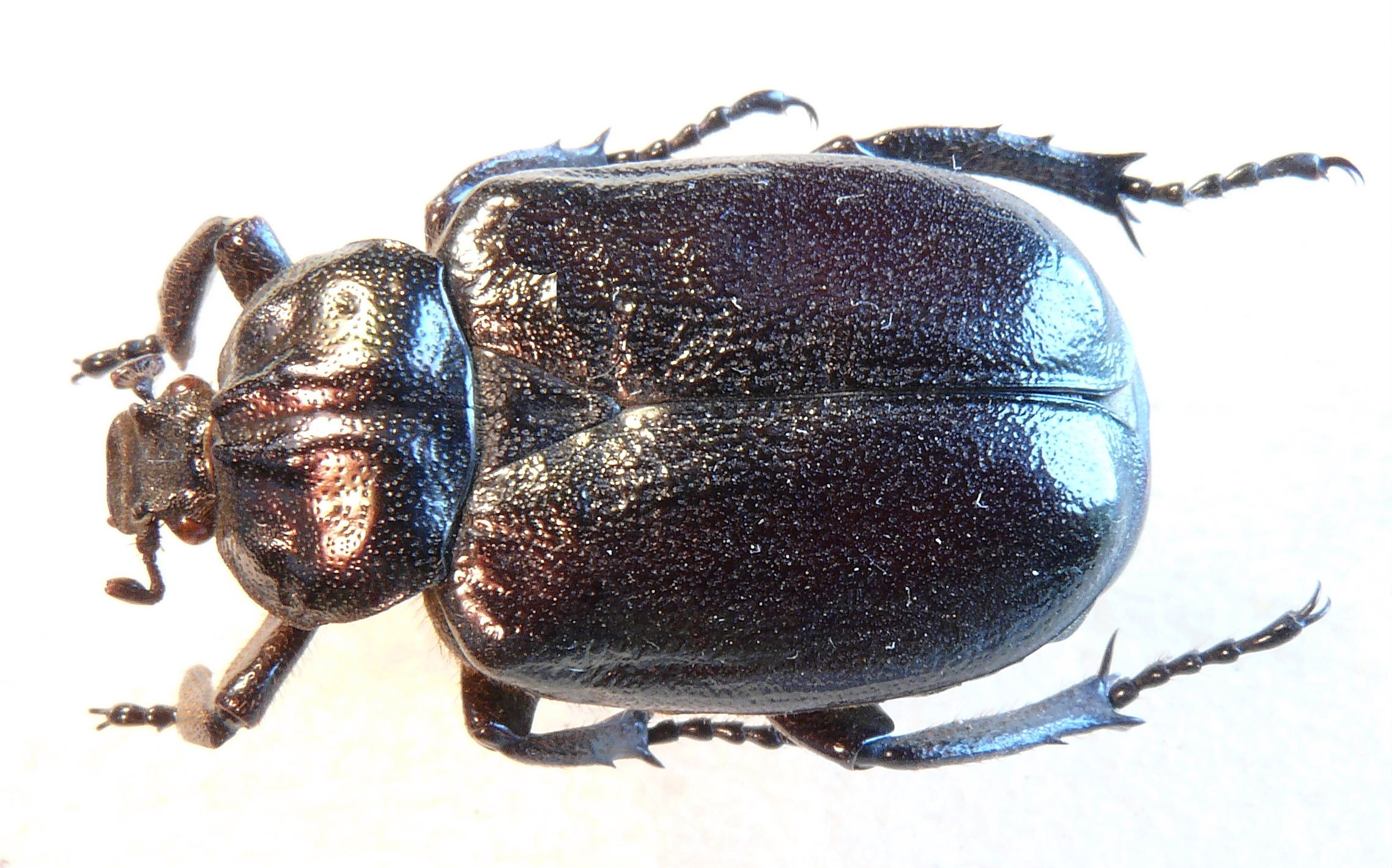 male Osmoderma eremita